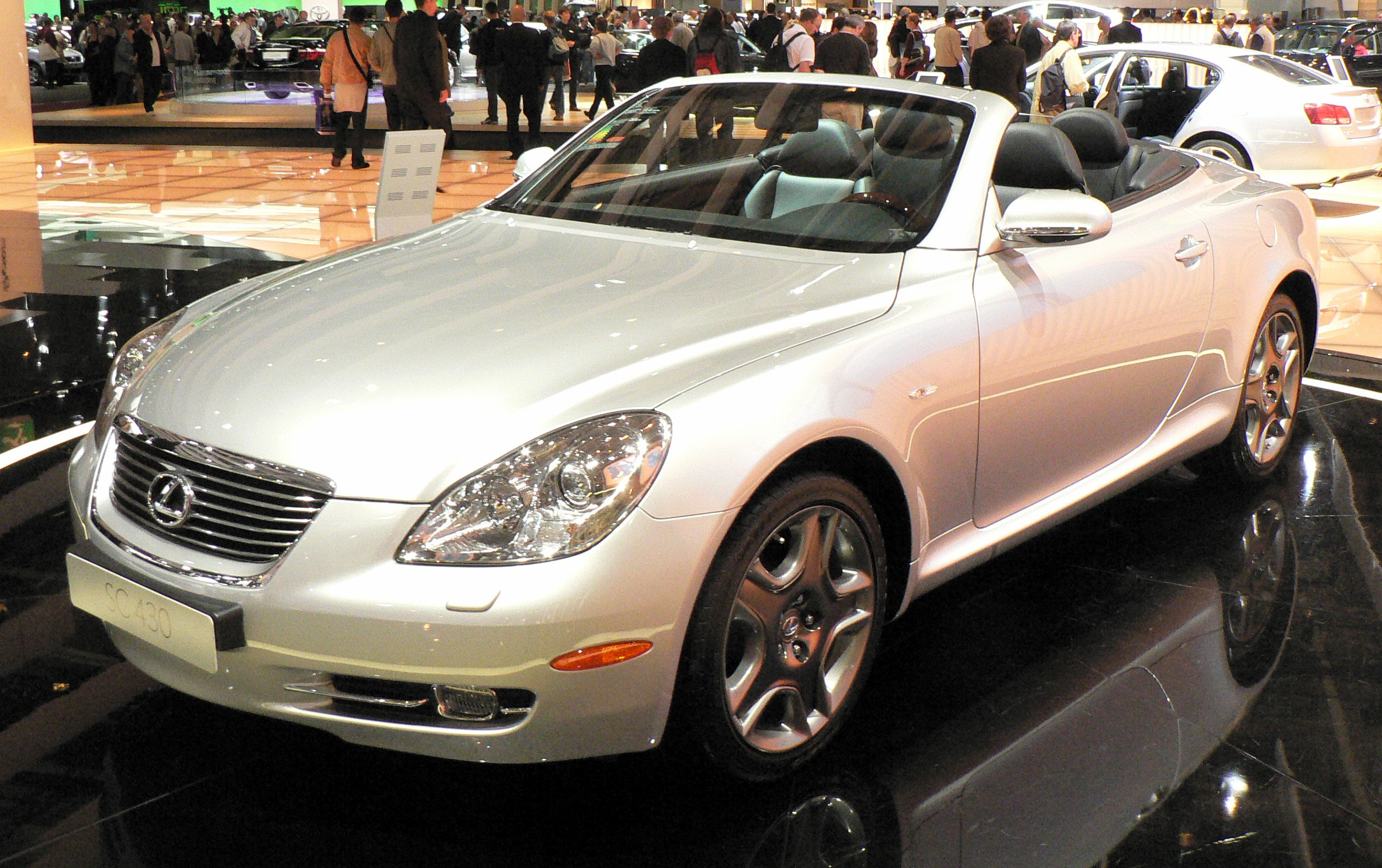 Mondial de l automobile de Paris (October 2006)